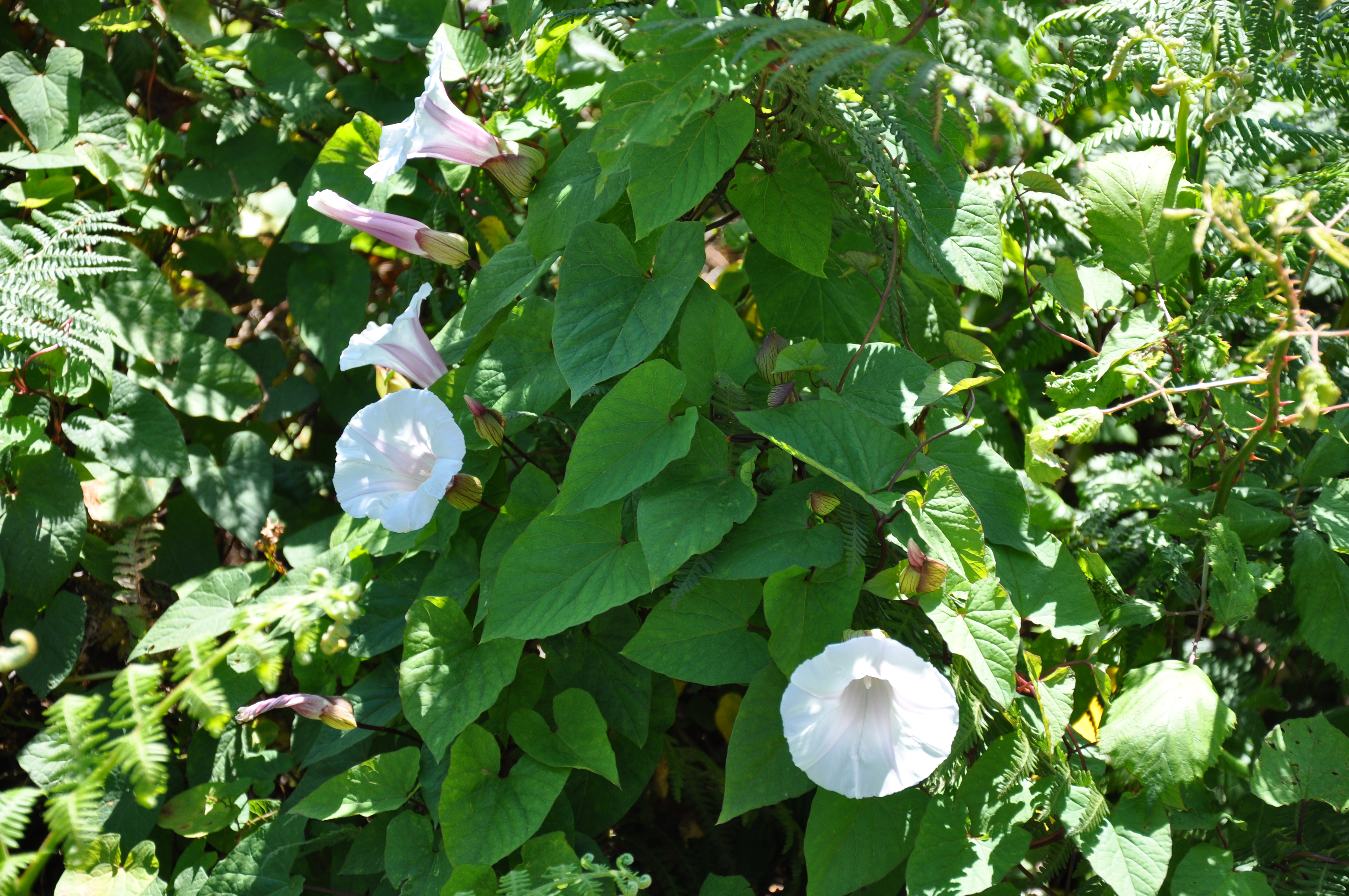 Campanilla (Calystegia silvatica) Ceuta España.